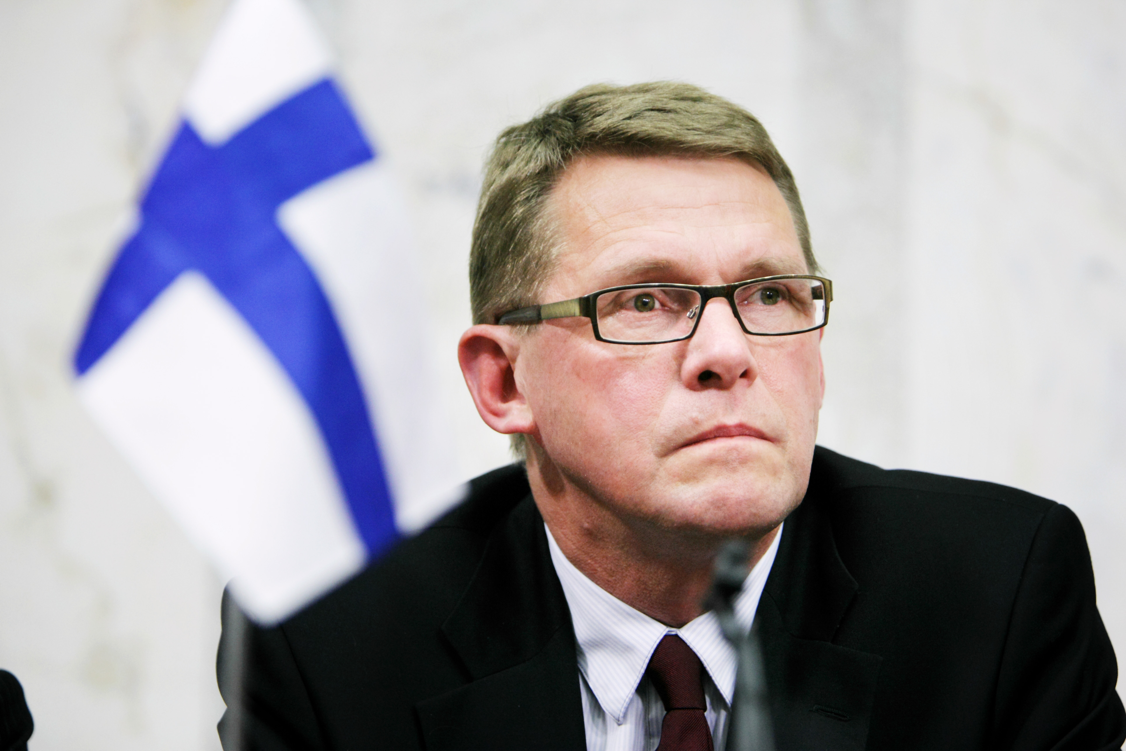 Finlands statsminister Matti Vanhanen på pressmöte vid Nordiska rådet session i Stockholm 2009.